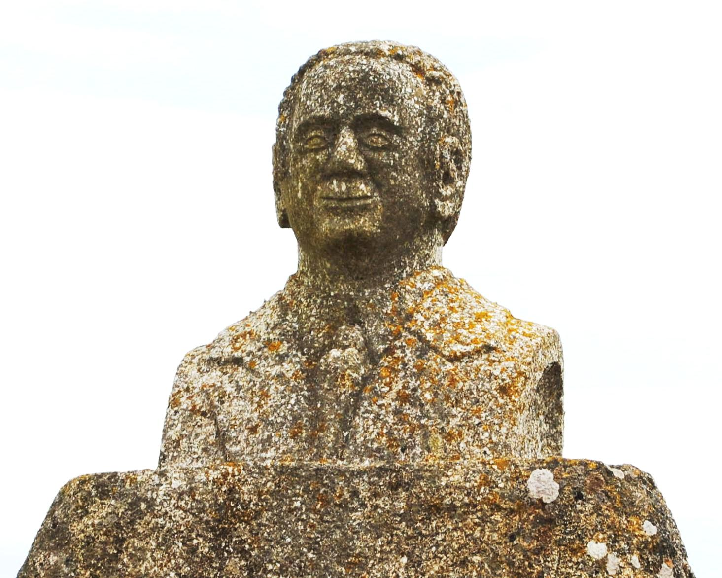 Vexa o título e as categorías.